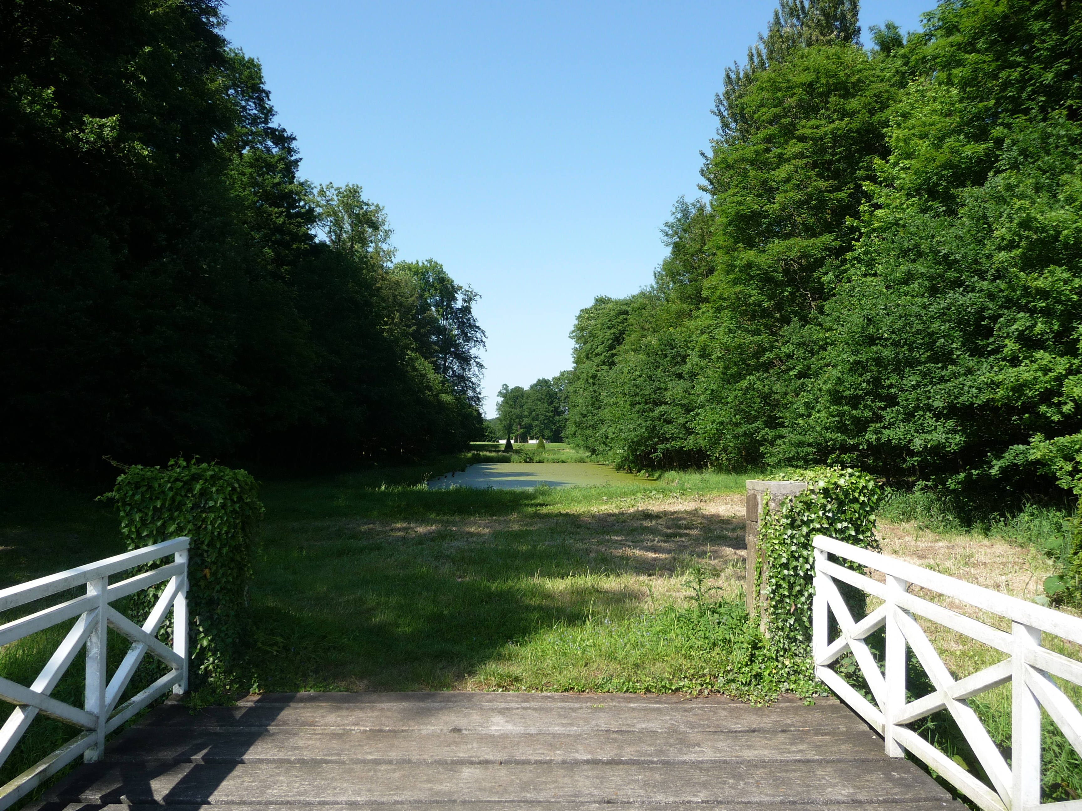 Schloss Gesmold ist ein zweiflügeliges Renaissanceschloss im Meller Stadtteil Gesmold. Erstmalig erwähnt wurde es 1160. Seit 1664 befindet sich das Schloss im Besitz der Adelsfamilie von Hammerstein. Öffentliche Führungen nach Absprache, öffentlicher Schlossladen und Schlosscafé.